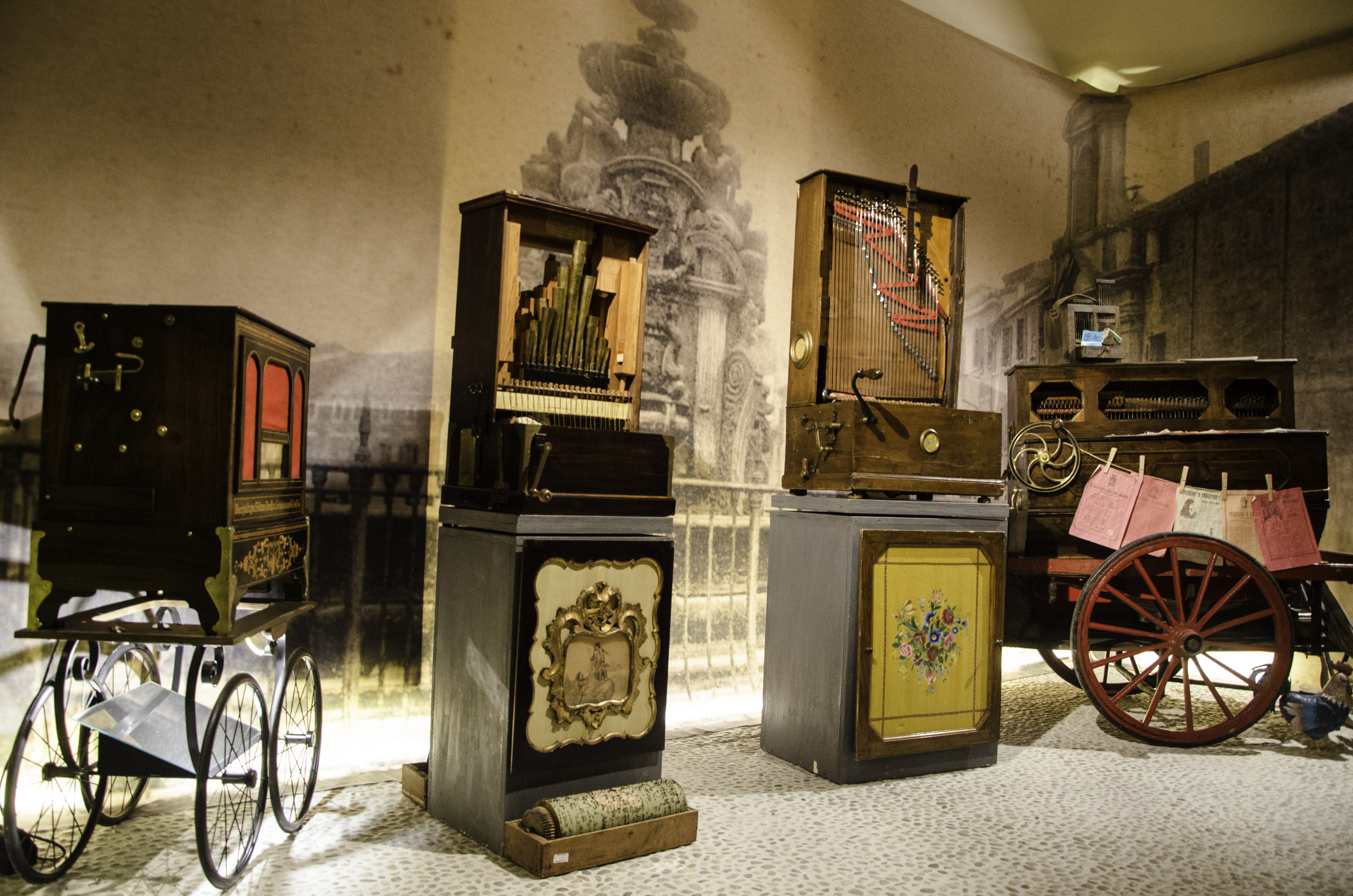 Villa Silvia-Carducci This is a photo of a monument which is part of cultural heritage of Italy.